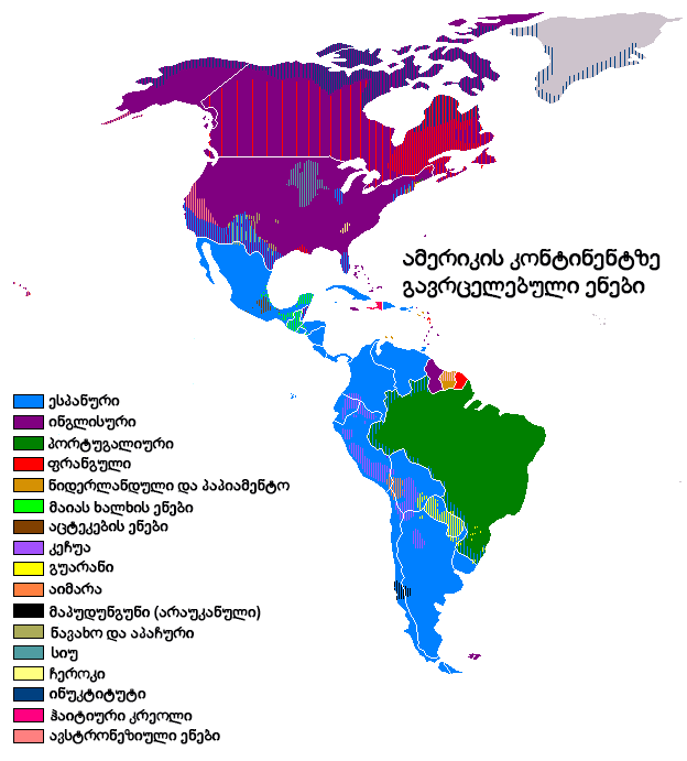 Languages of the Americas (georgian) ჩრდილოეთ ამერიკელი ხალხის სალაპარაკო ენები